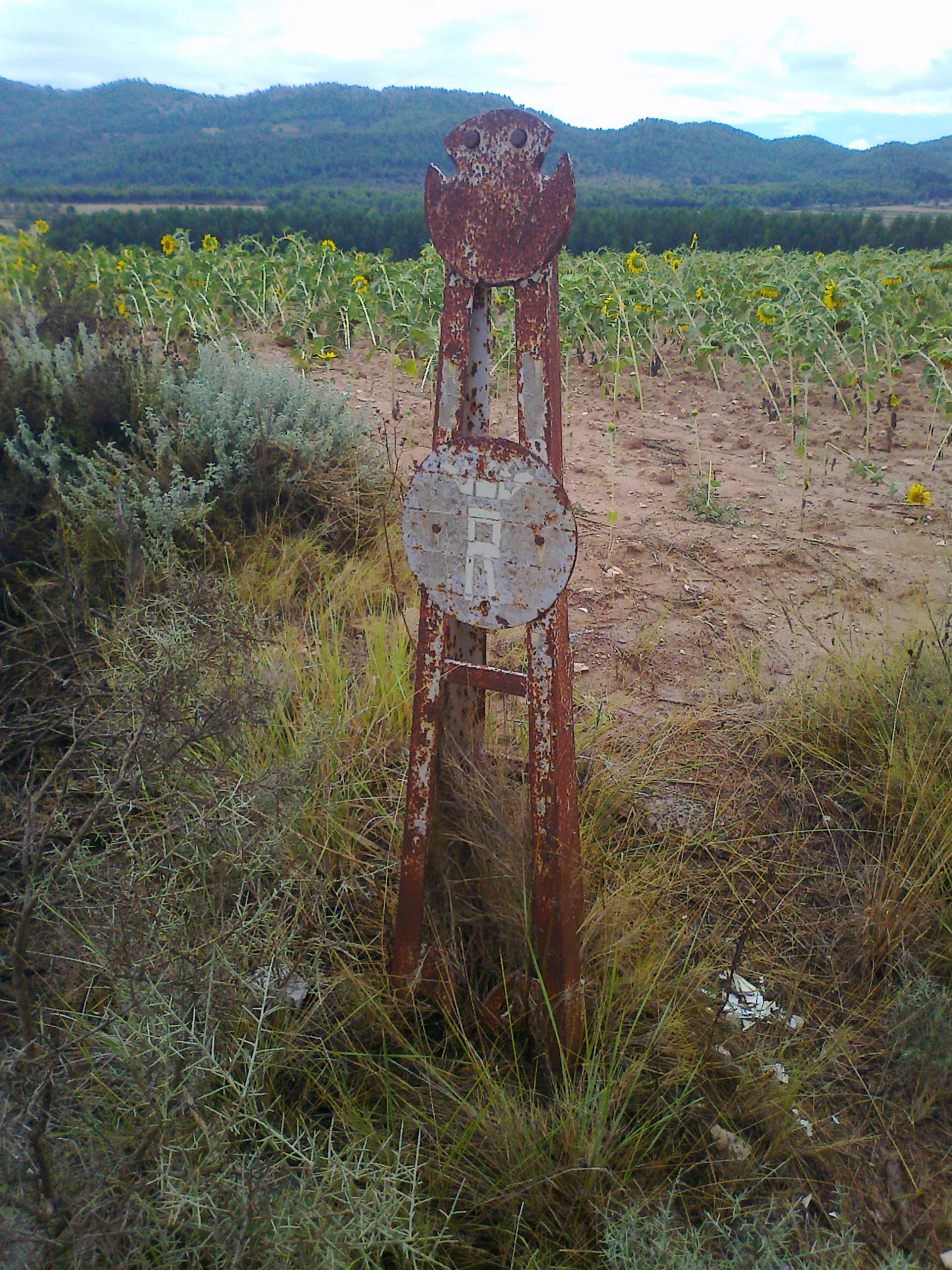 Senyal del Marques de Rubalcaba, en el Vall de Polop, Alcoy (Alacant). En el moment en que es colocà el marquesat pertanyia al llinage Almunia.